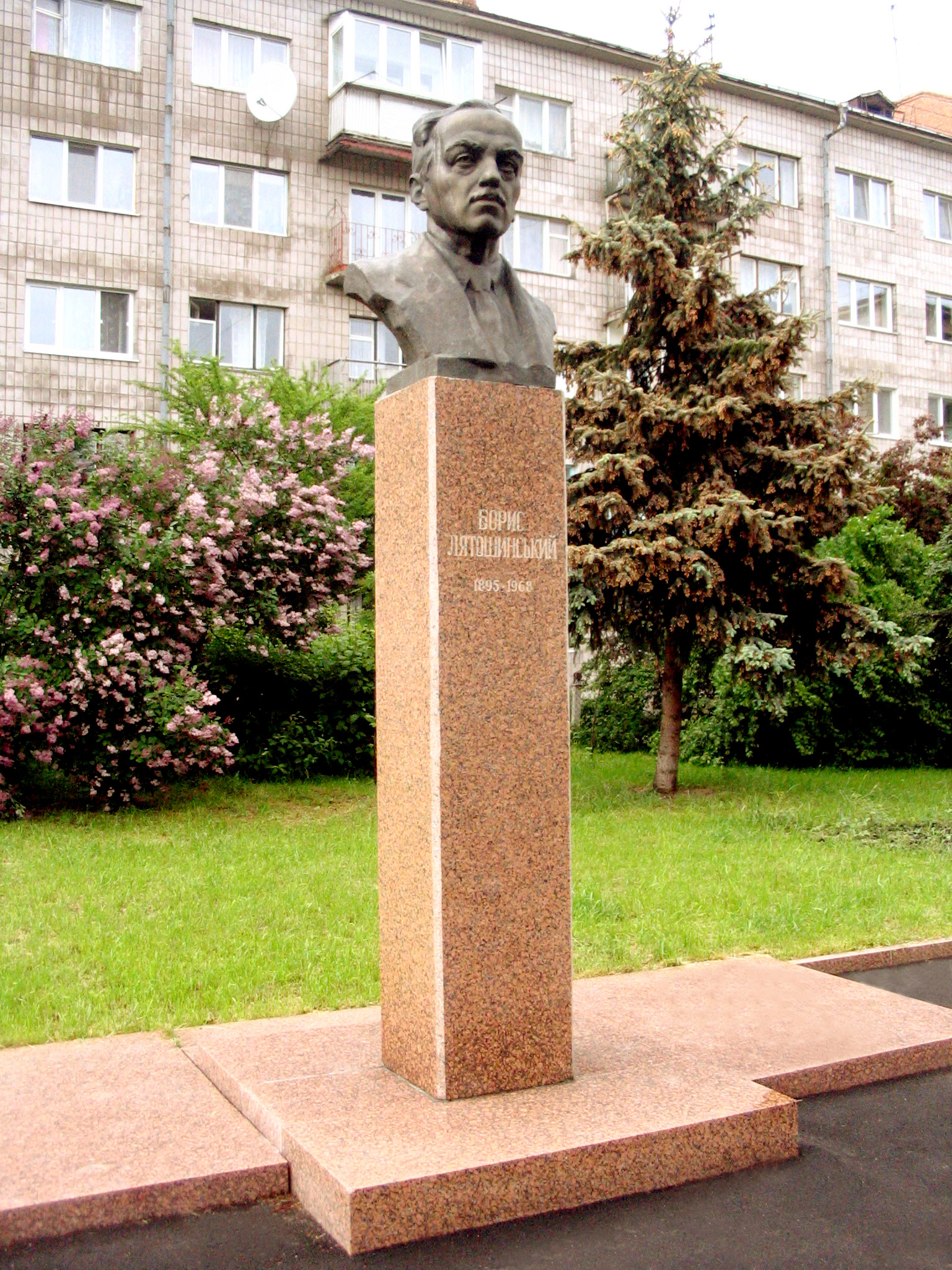 Борис Лятошинський (1895-1968) - український композитор, диригент і педагог